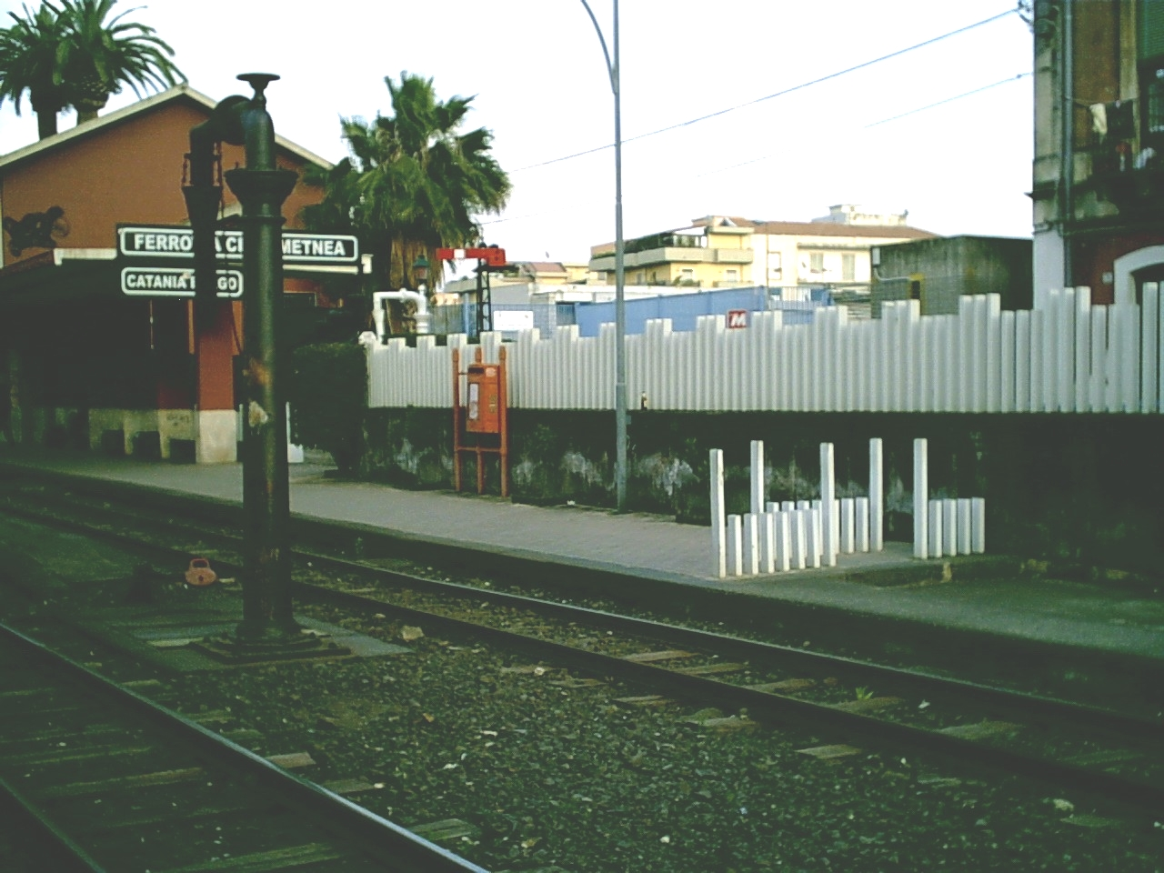 Stazione Catania-Borgo della Ferrovia Circumetnea.